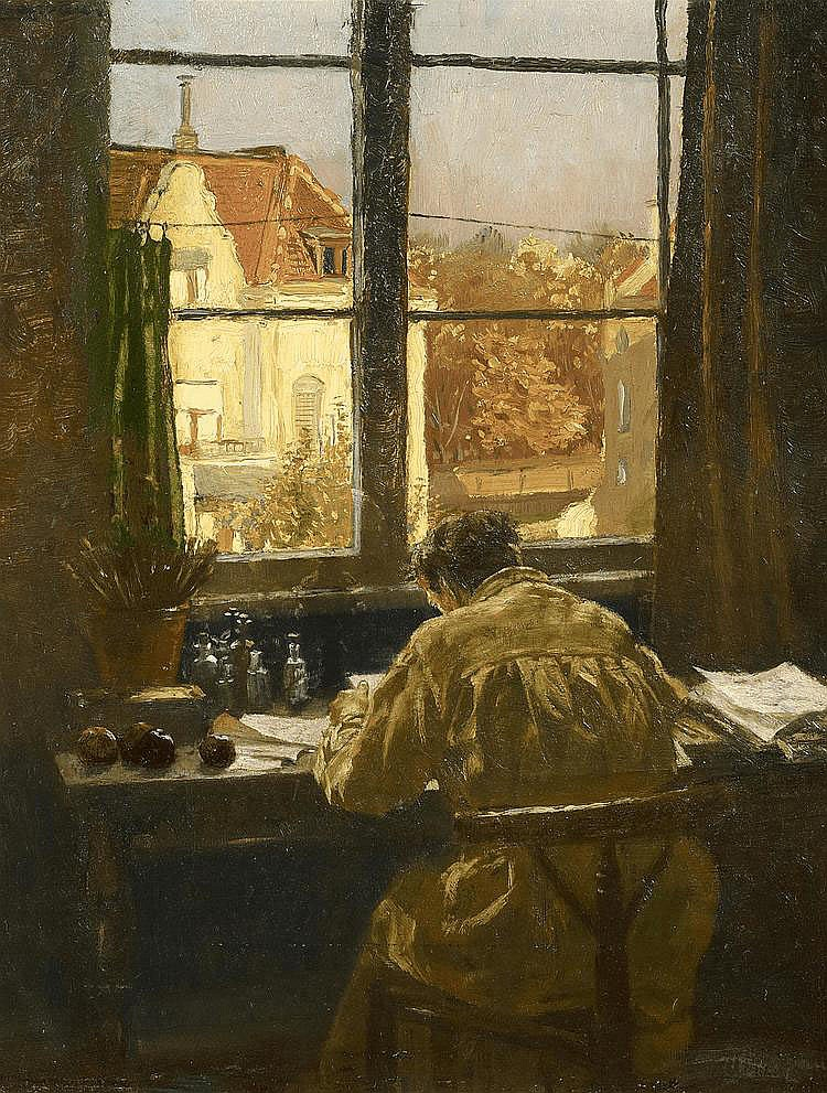 Am Atelierfenster